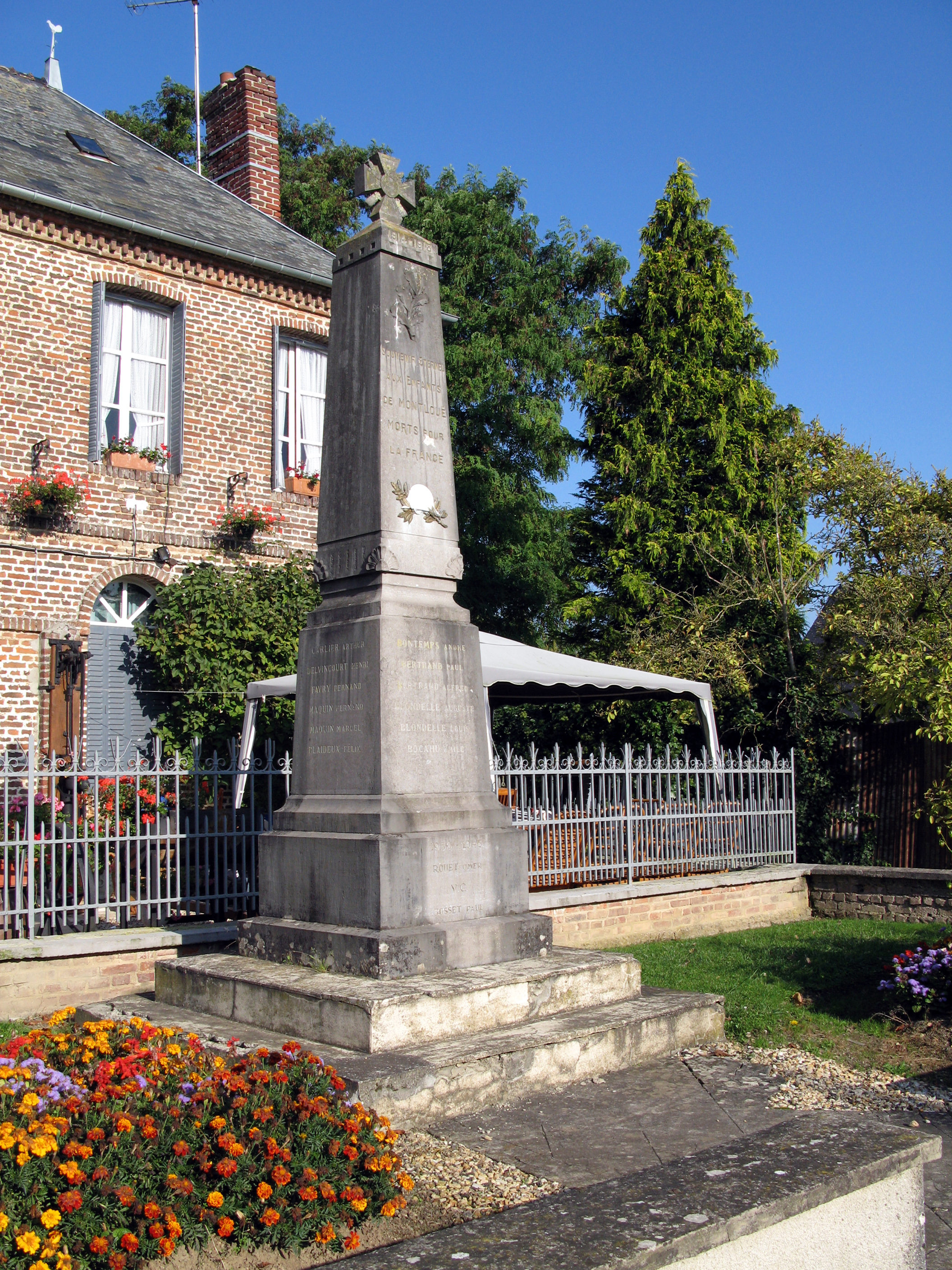 Montloué (Aisne, France) - Le monument-aux-morts.